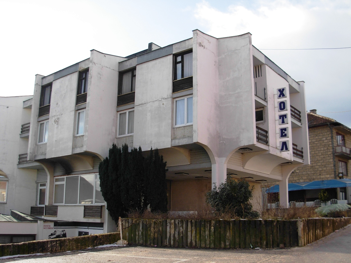 Hotel "Krajina" u Mrkonjić Gradu.